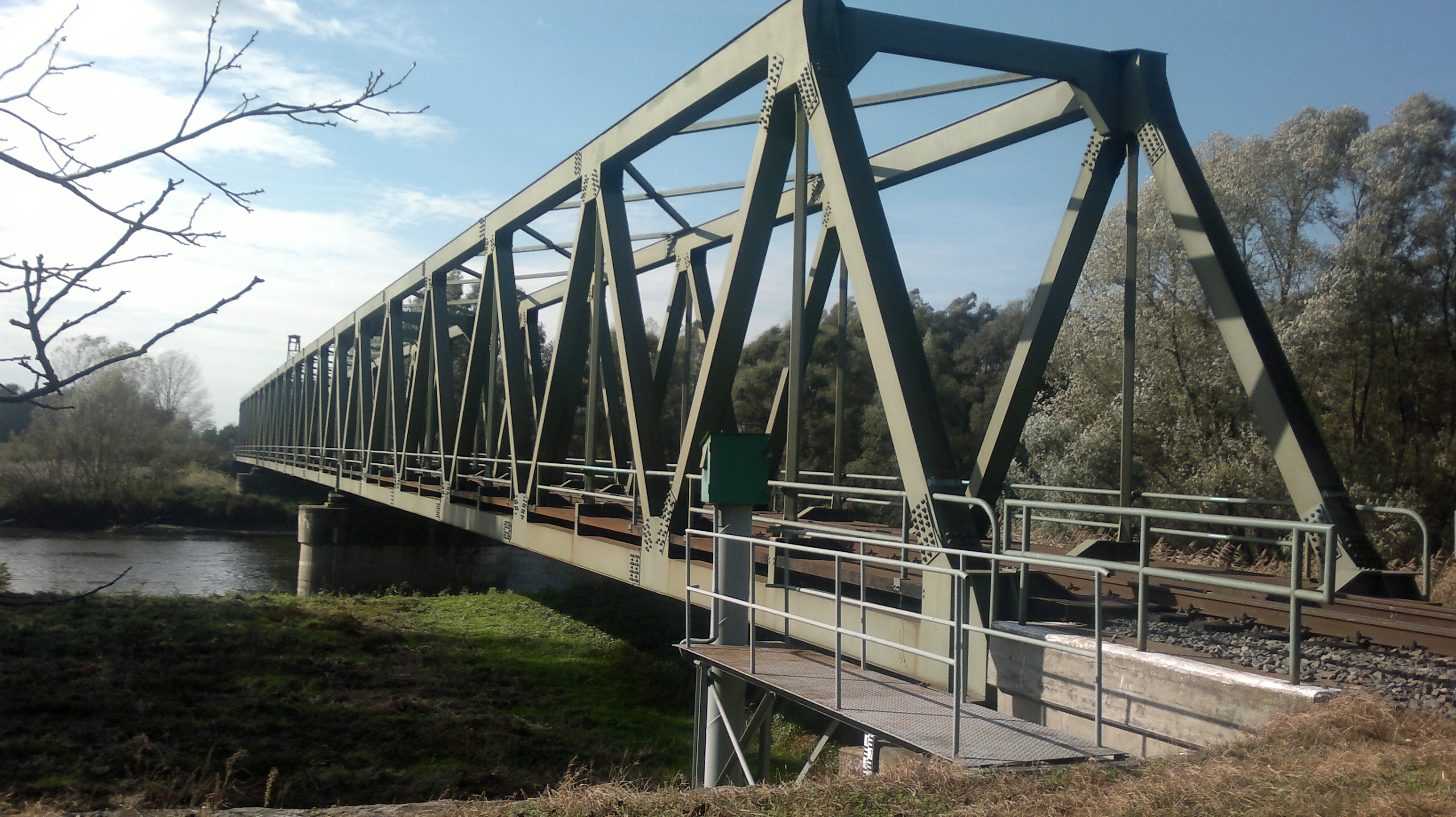 Határhíd a Mura folyón